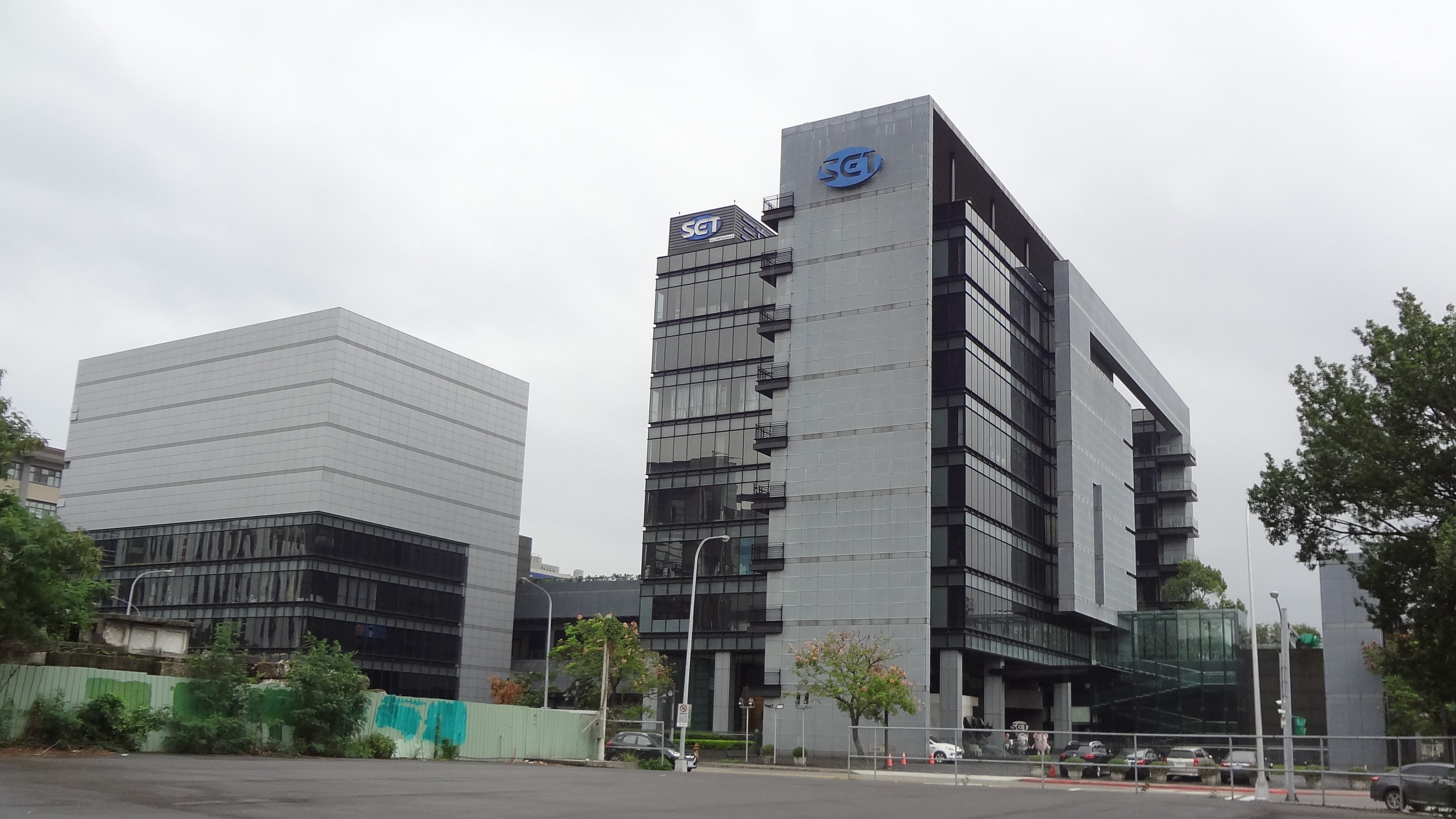 三立電視總部，位於臺北市內湖區舊宗路一段159號。